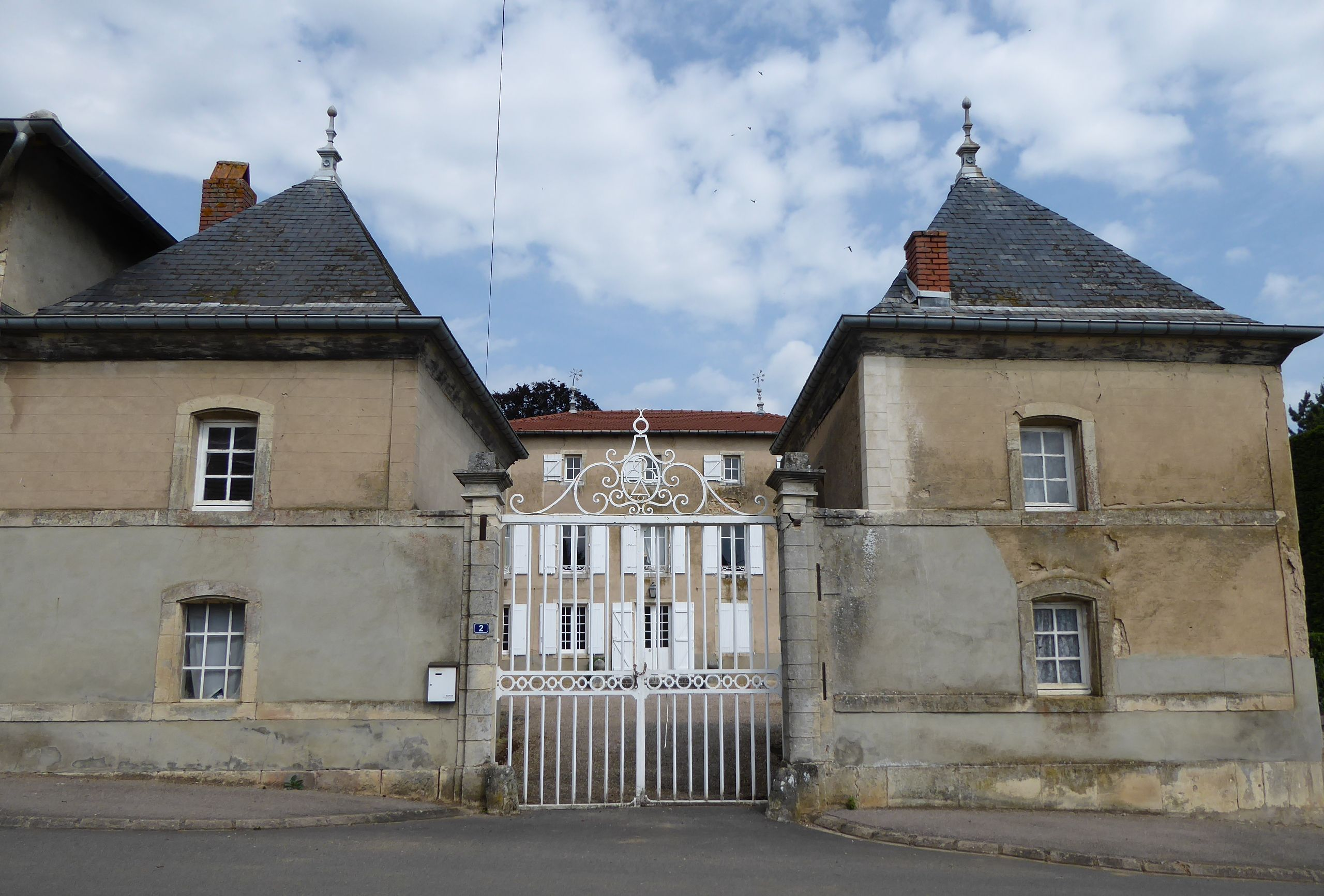 Maison XVIIIème siècle à Bey-sur-Seille en Meurthe-et-Moselle (France).